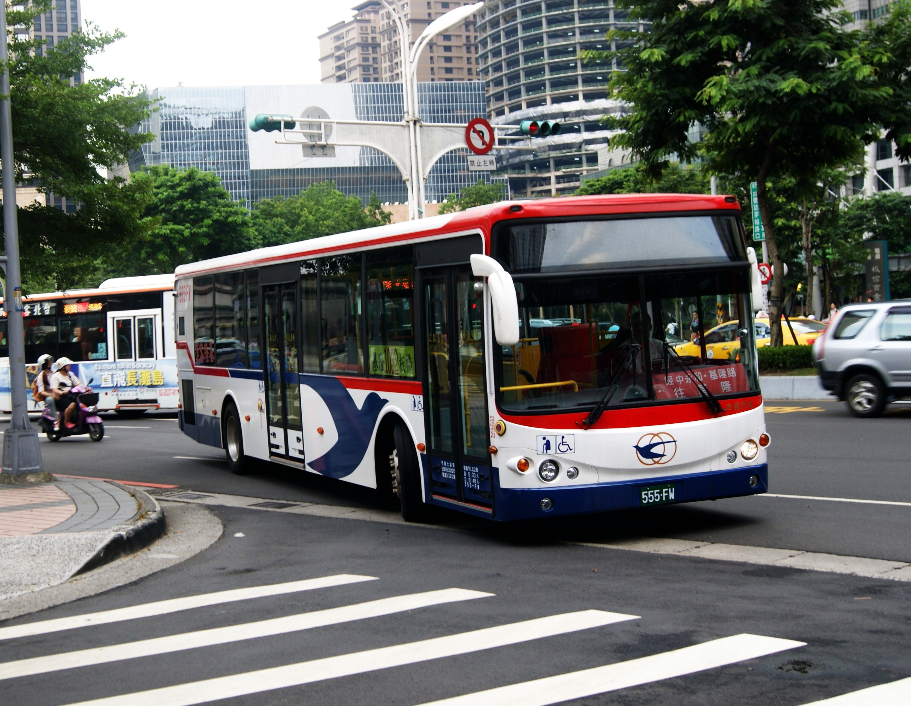 基隆客運2012年金龍KL6120A2低地板公車555-FW。